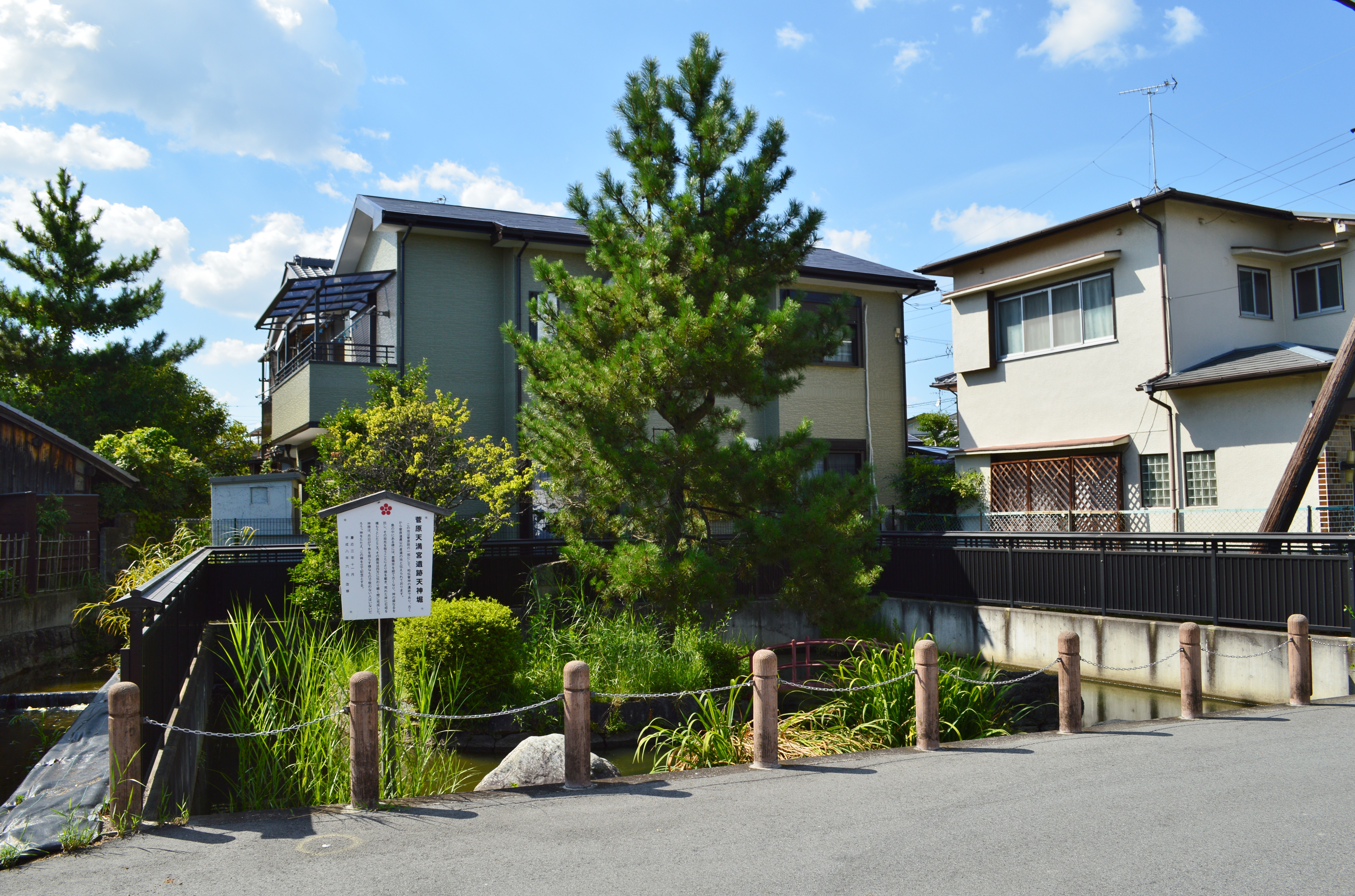 菅原神社 (奈良市) 菅原院跡